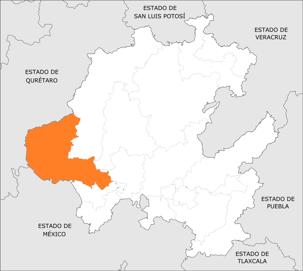 Distrito Electoral Local de Hidalgo 06